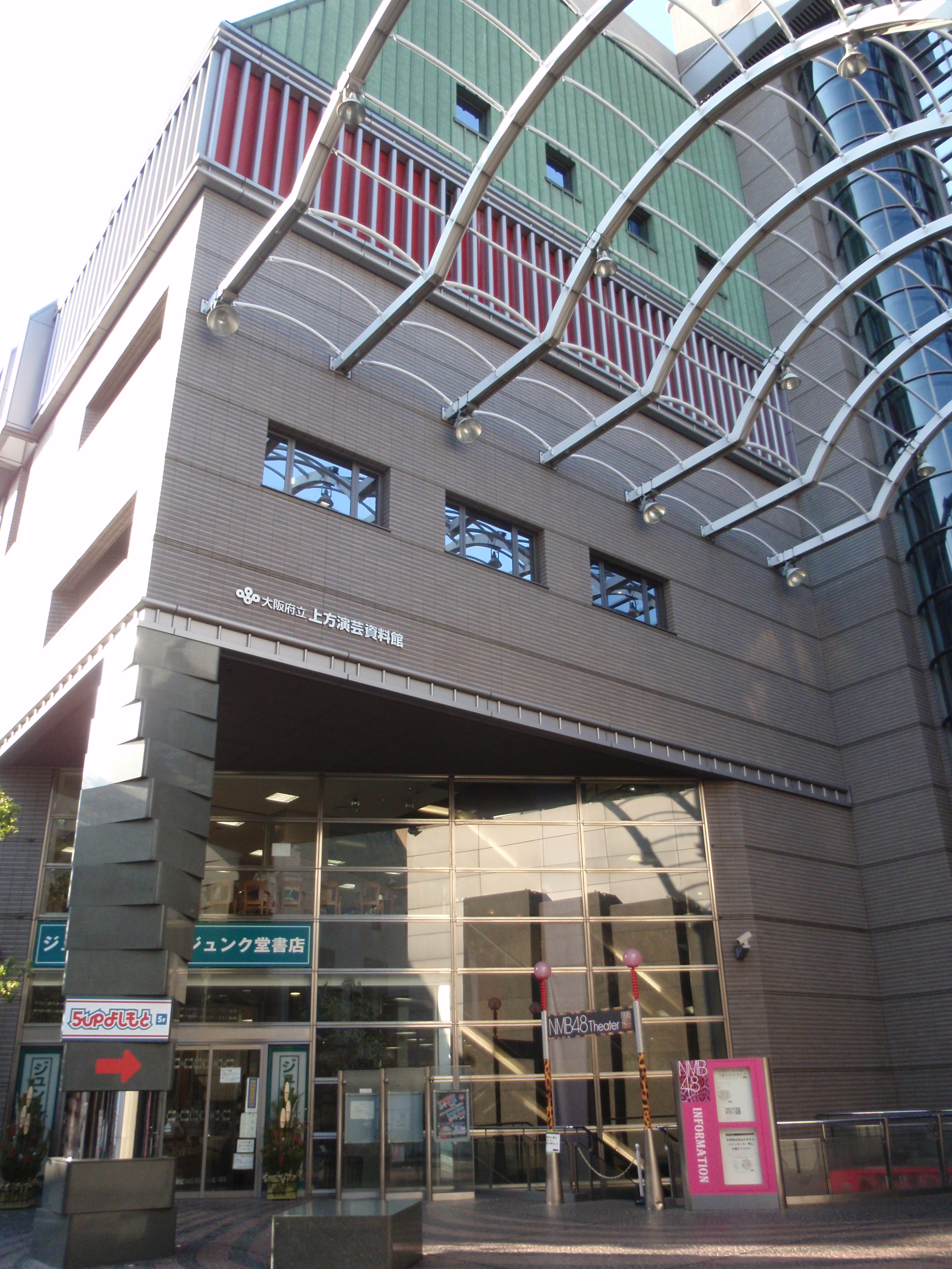 YES-NAMBAビル外観、大阪市中央区難波千日前。